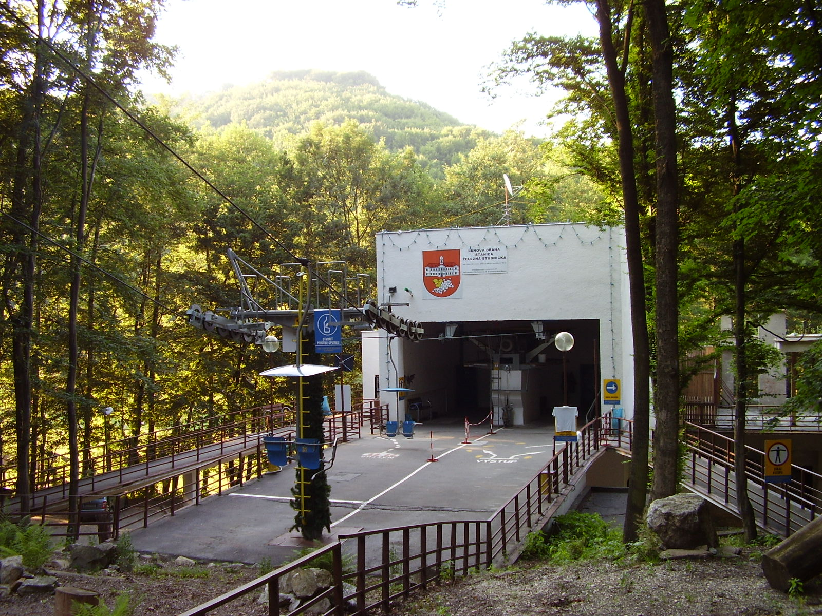 Stanica lanovky na Železnej studienke. Stanica Železná studienka.